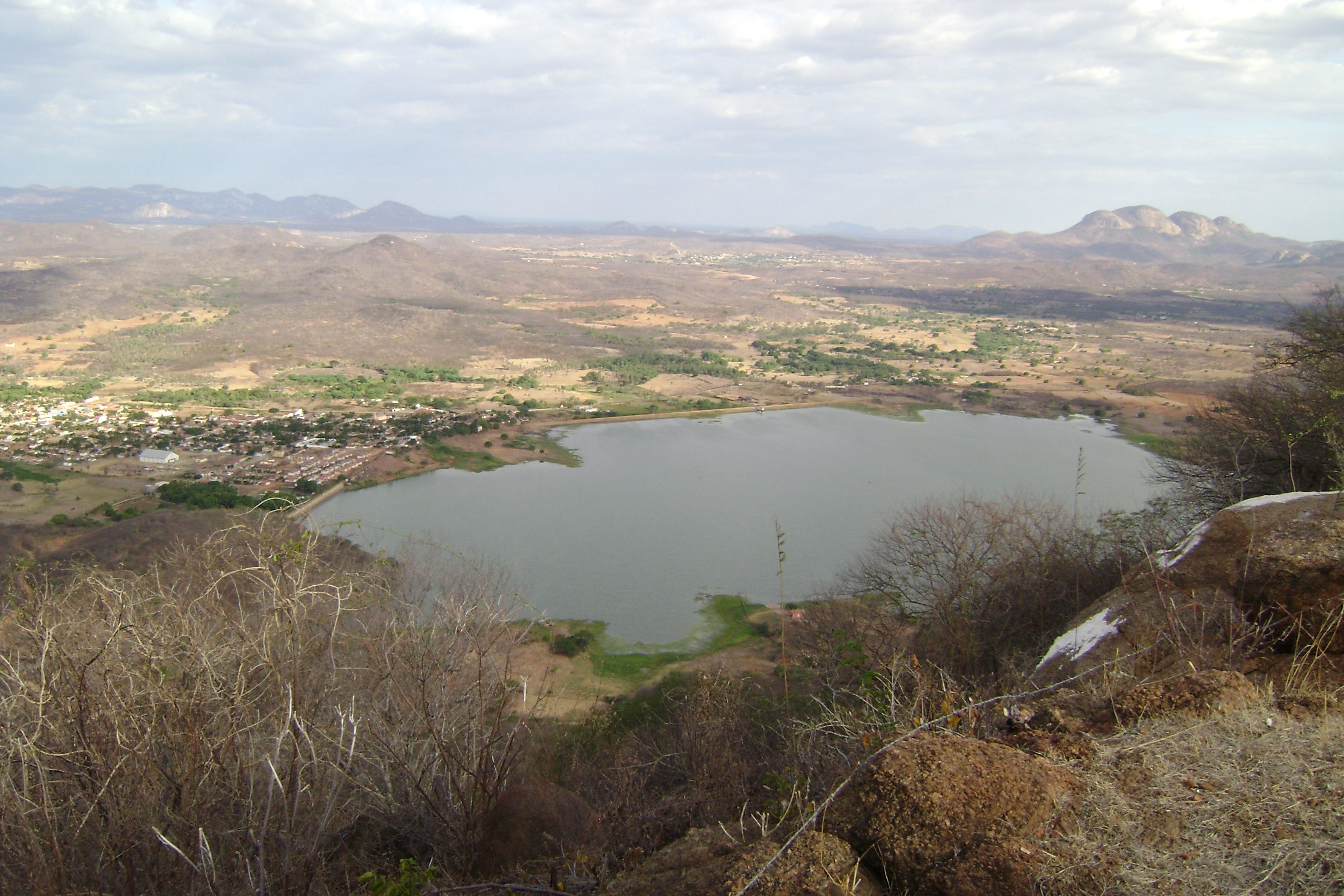 Vista da cidade de Lucrécia RN